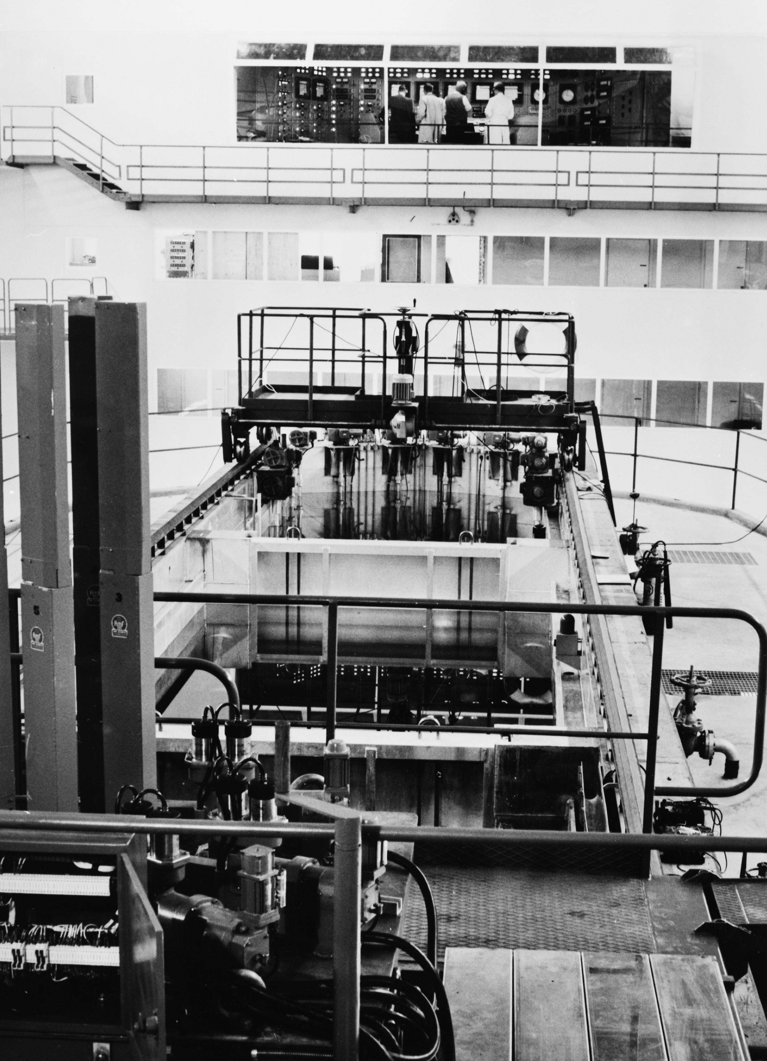 R2-reaktorn i Studsvik.Bassängen och kontrollrummet.